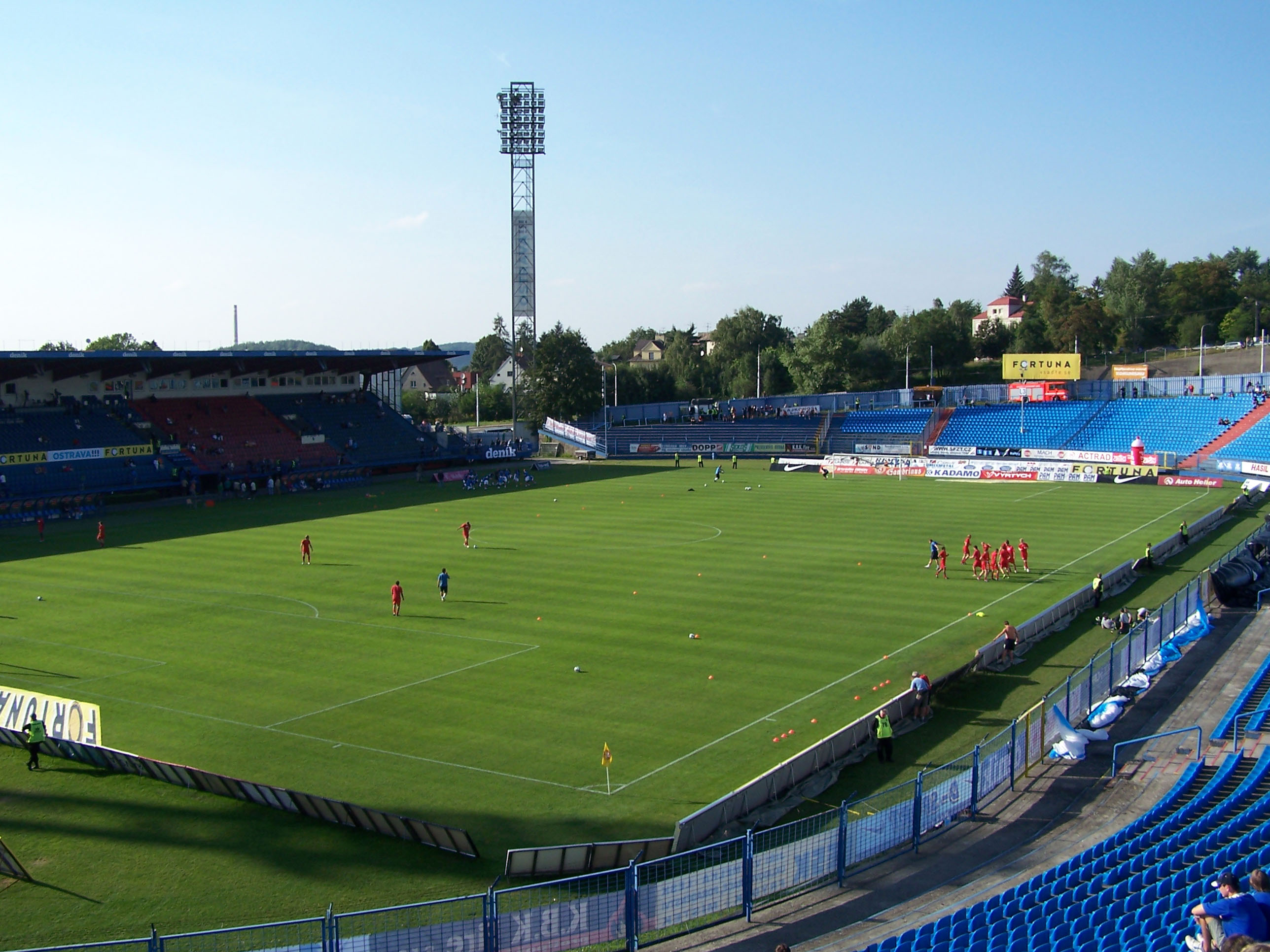 Bazaly Stadium before FC Baník Ostrava - 1. FC Brno match in Ostrava